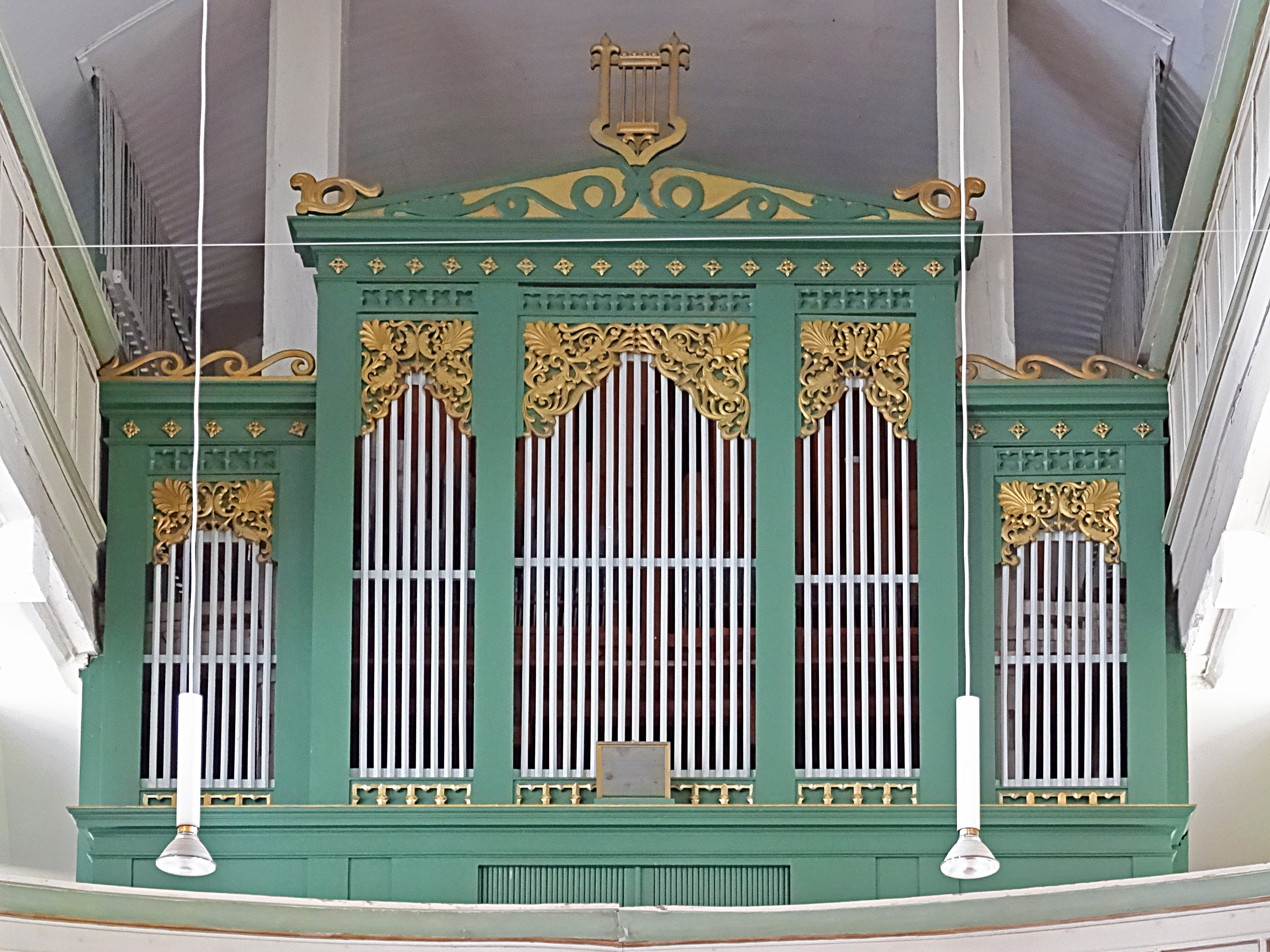 Orgel von Friedrich Christian Knauf (1856, IIP 18) in der St.-Johannis-Kirche (Winterstein)